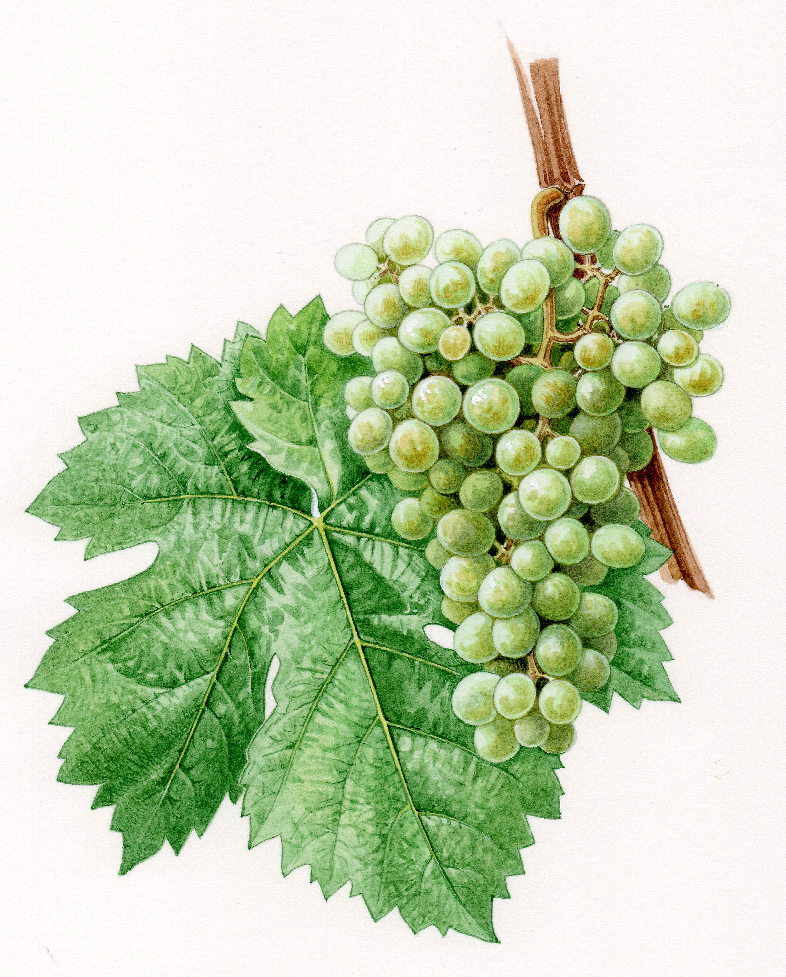 Aquarelle originale pour les Cépages de France (2001)